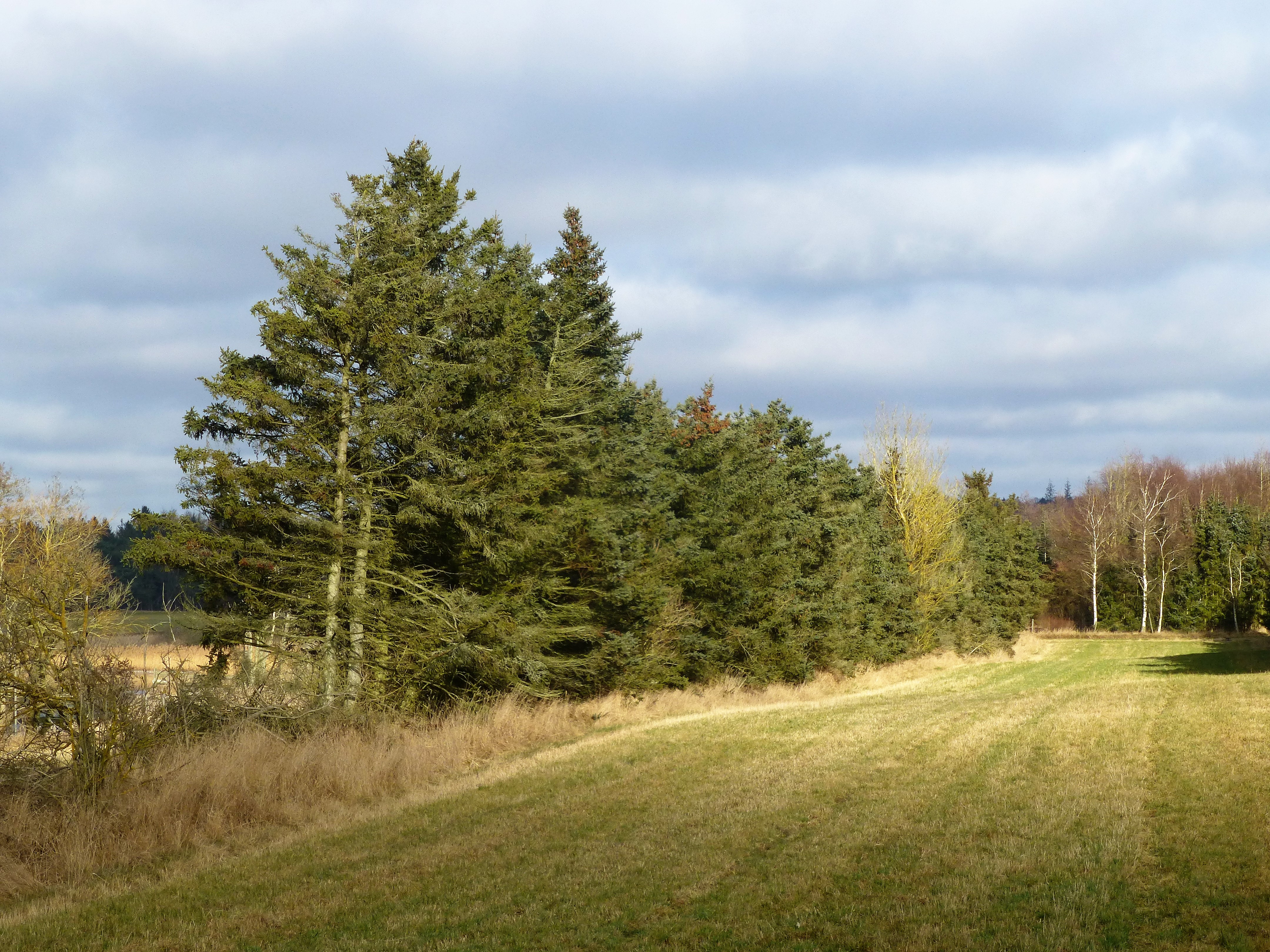 Læhegn af Hvidgran ved Sminge Sø